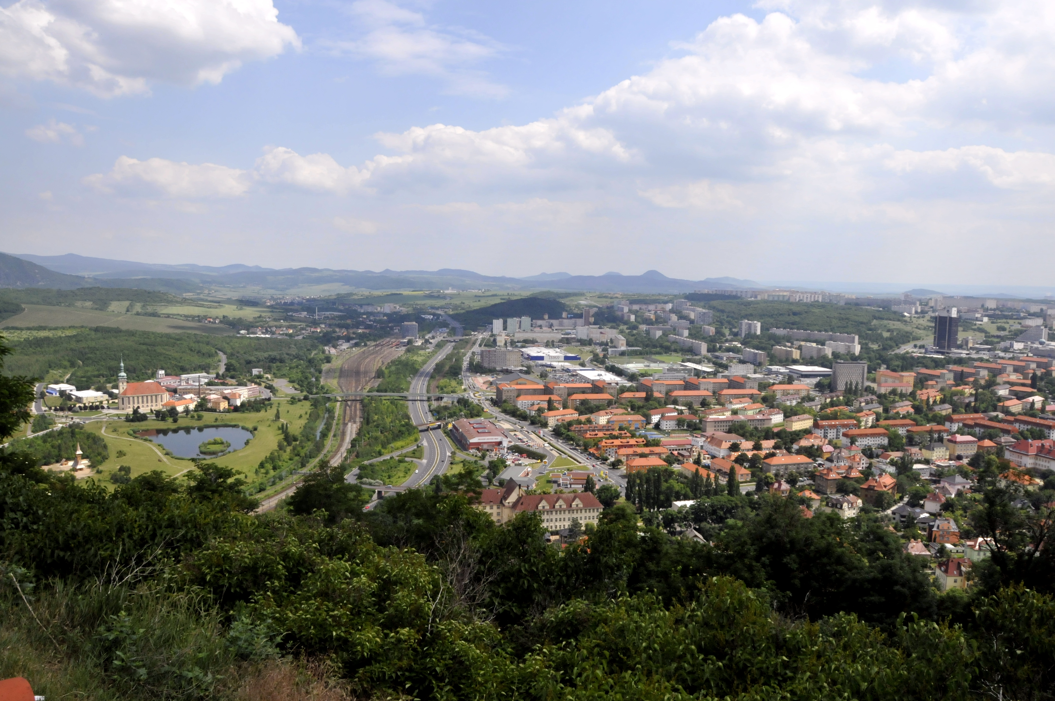 Most, Blick von der Burg Richtung Südwest